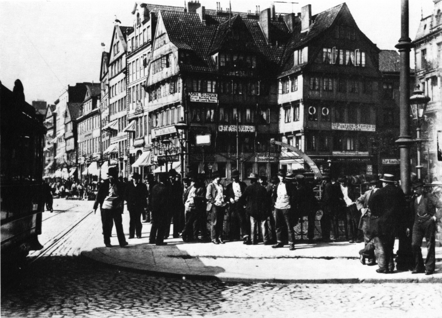 Hamburg: Auf Arbeit wartende Hafenarbeiter am Baumwall, Roosenbrücke, nahe dem Hamburger Hafen. Die Häuser im Hintergrund dienten als Herbergen für Seeleute. Zudem fanden sich in diesen Häusern viele Hafenkneipen.